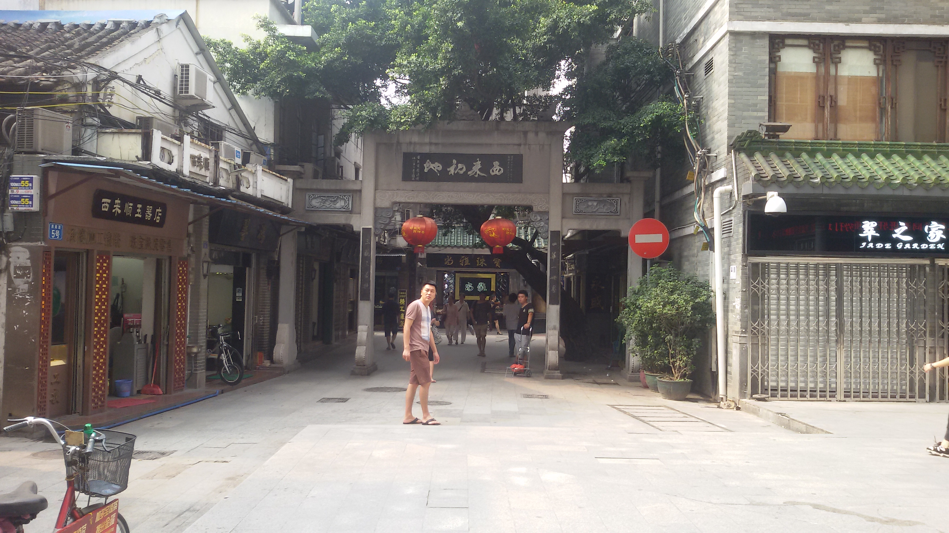 粵語: 西來初地嘅南牌坊